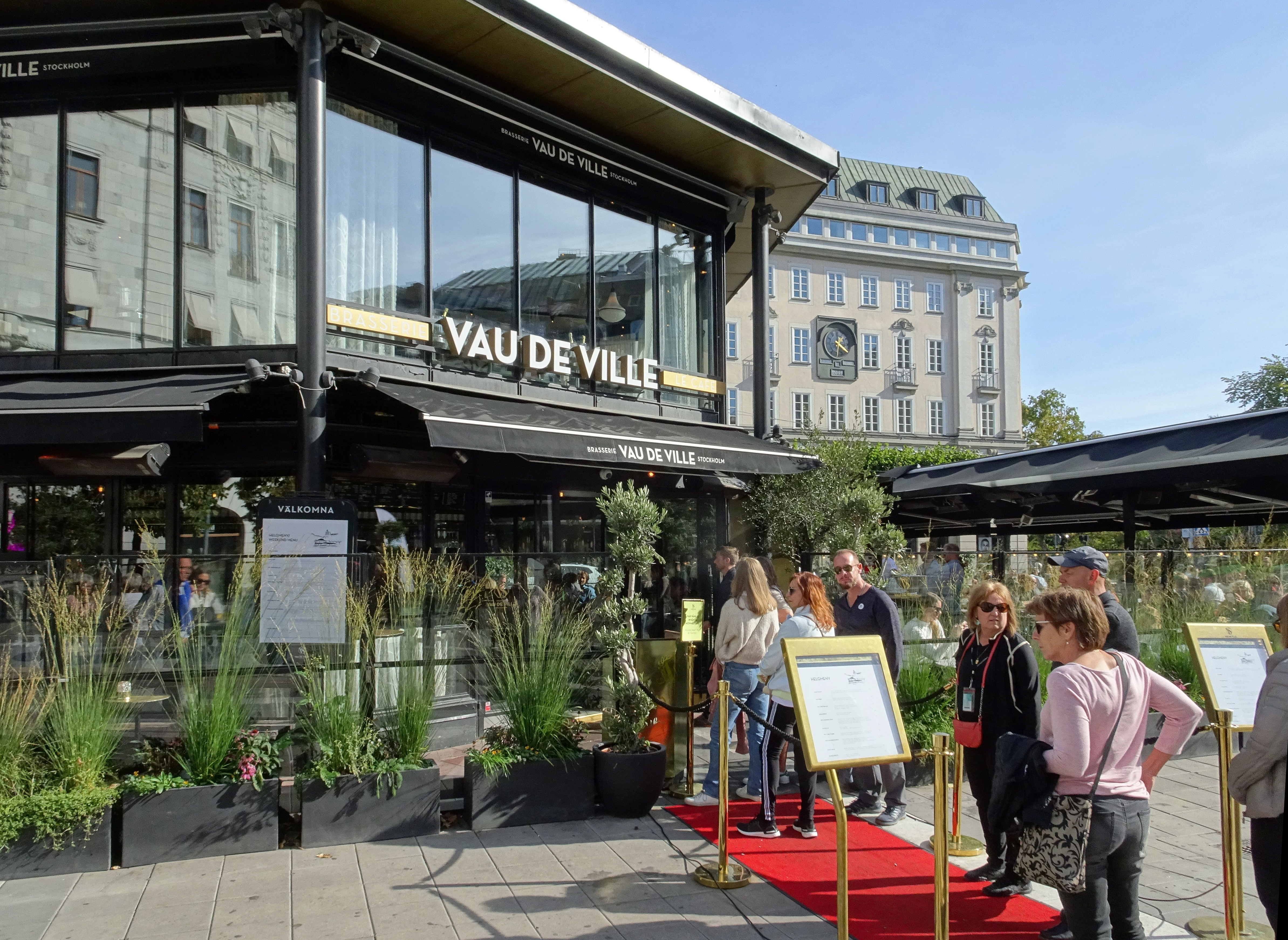 Vau de Ville på Norrmalmstorg, även kallat "Palmhuset" arkitekt Per Kallstenius (1993)